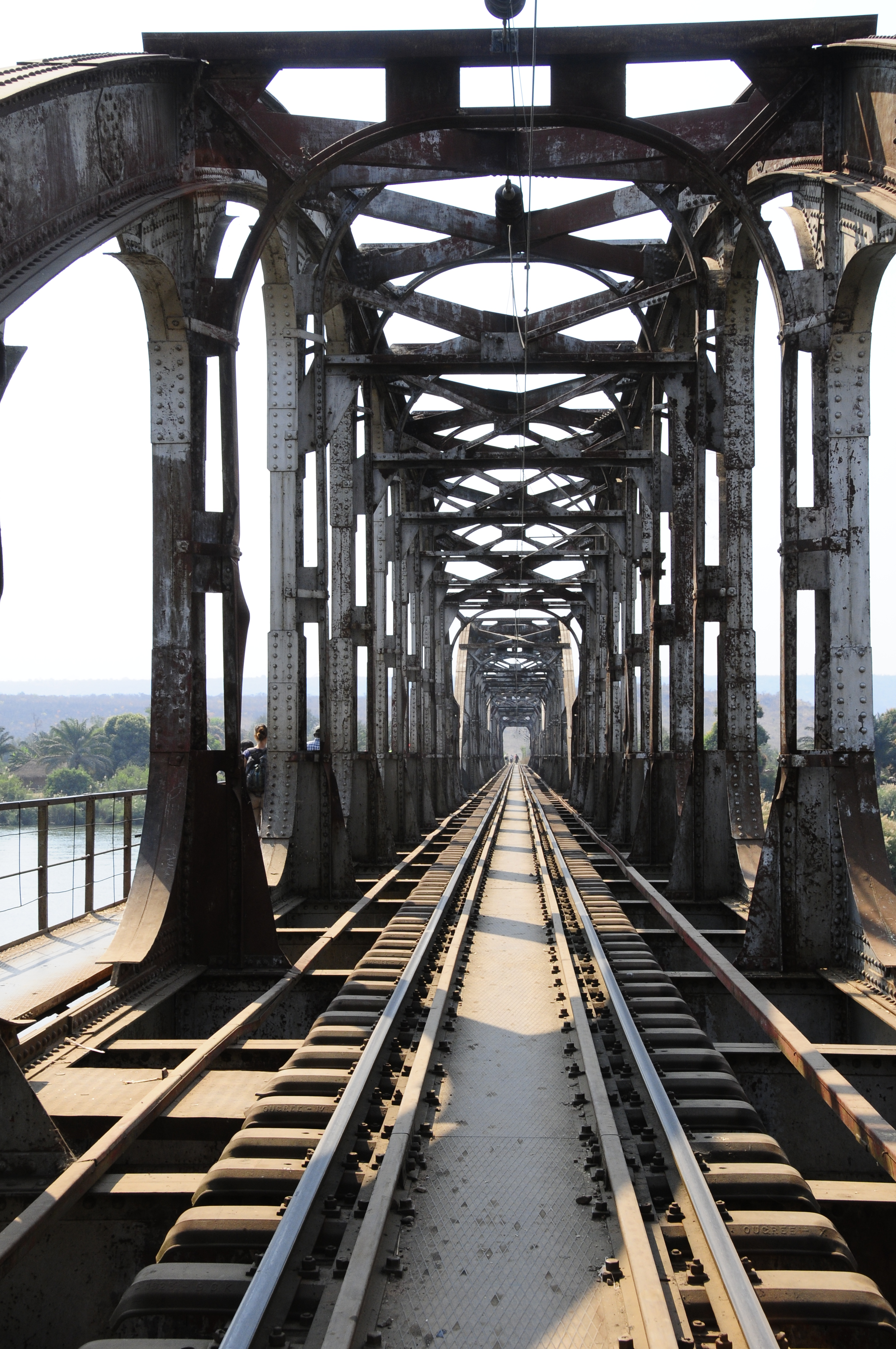 Bukama bridge/pont